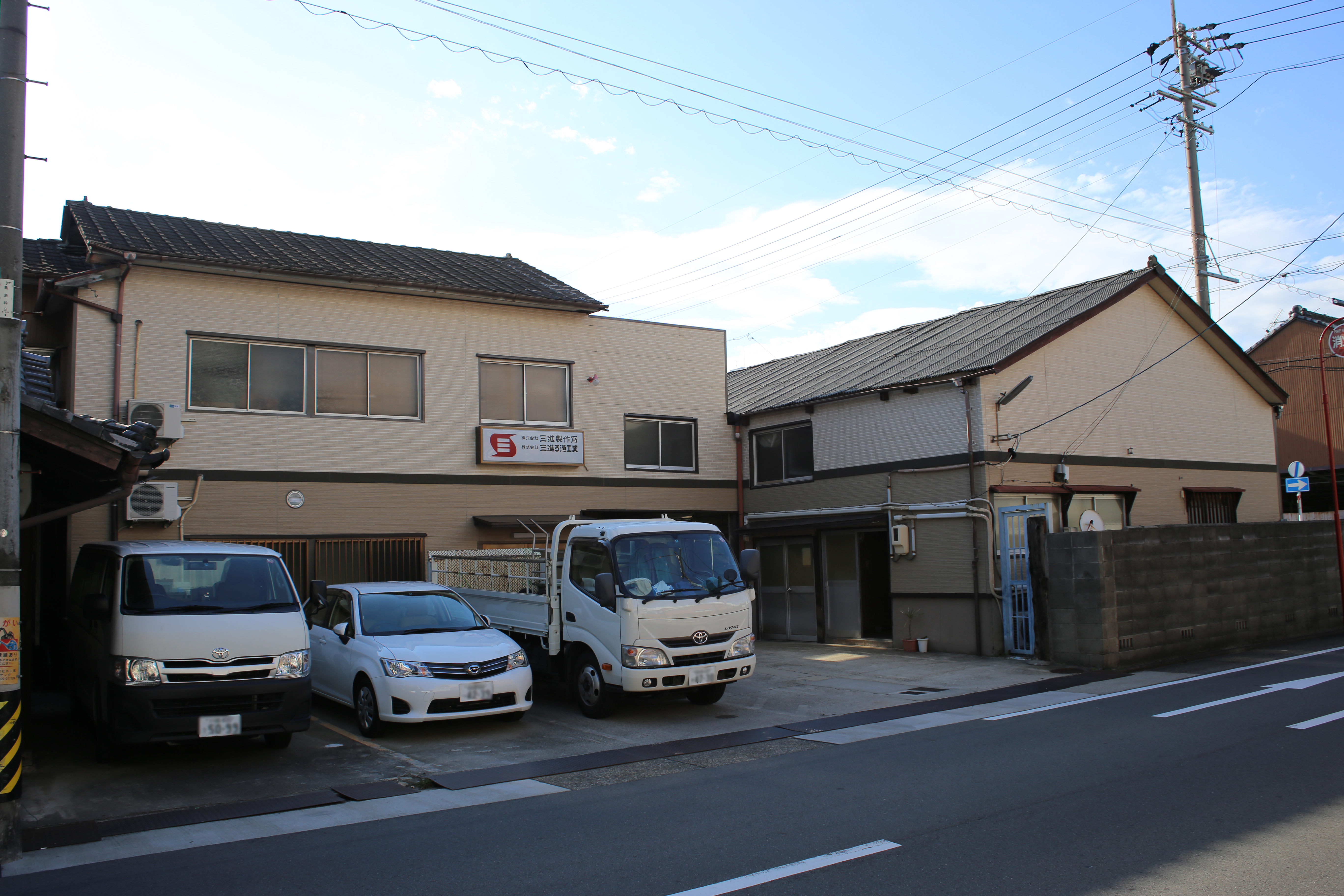 名古屋市中村区亀島二丁目の三進製作所本社を東側公道南側より撮影。ただし、ナンバープレートにつき画像処理済。